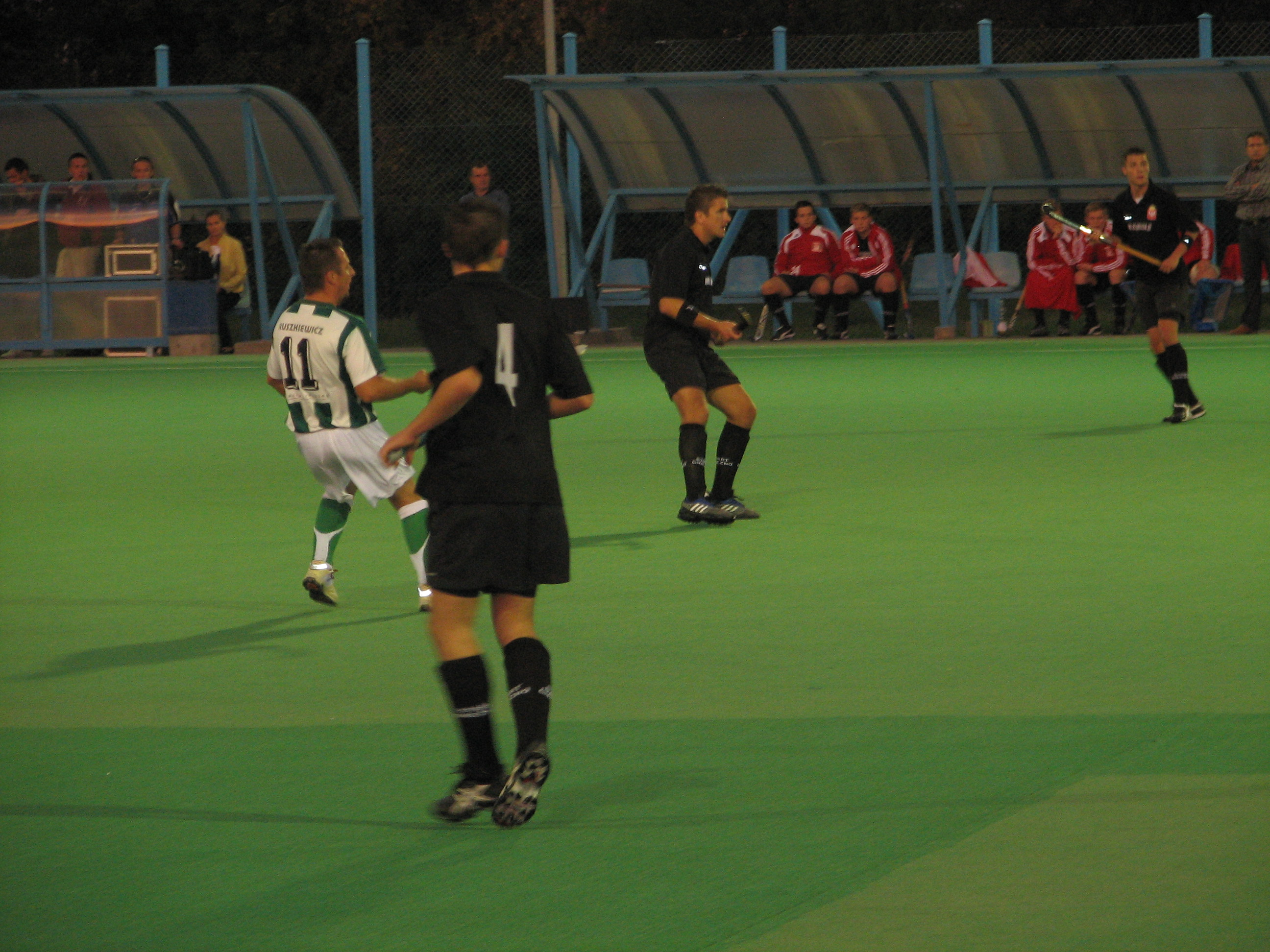 Derby Gniezna w hokeju na trawie. Pierwszoligowy mecz Stella - Start 1954 zakończony wynikiem 2:3.